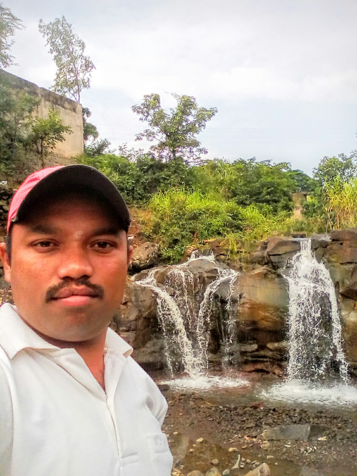 निसर्गरम्य धबधबा